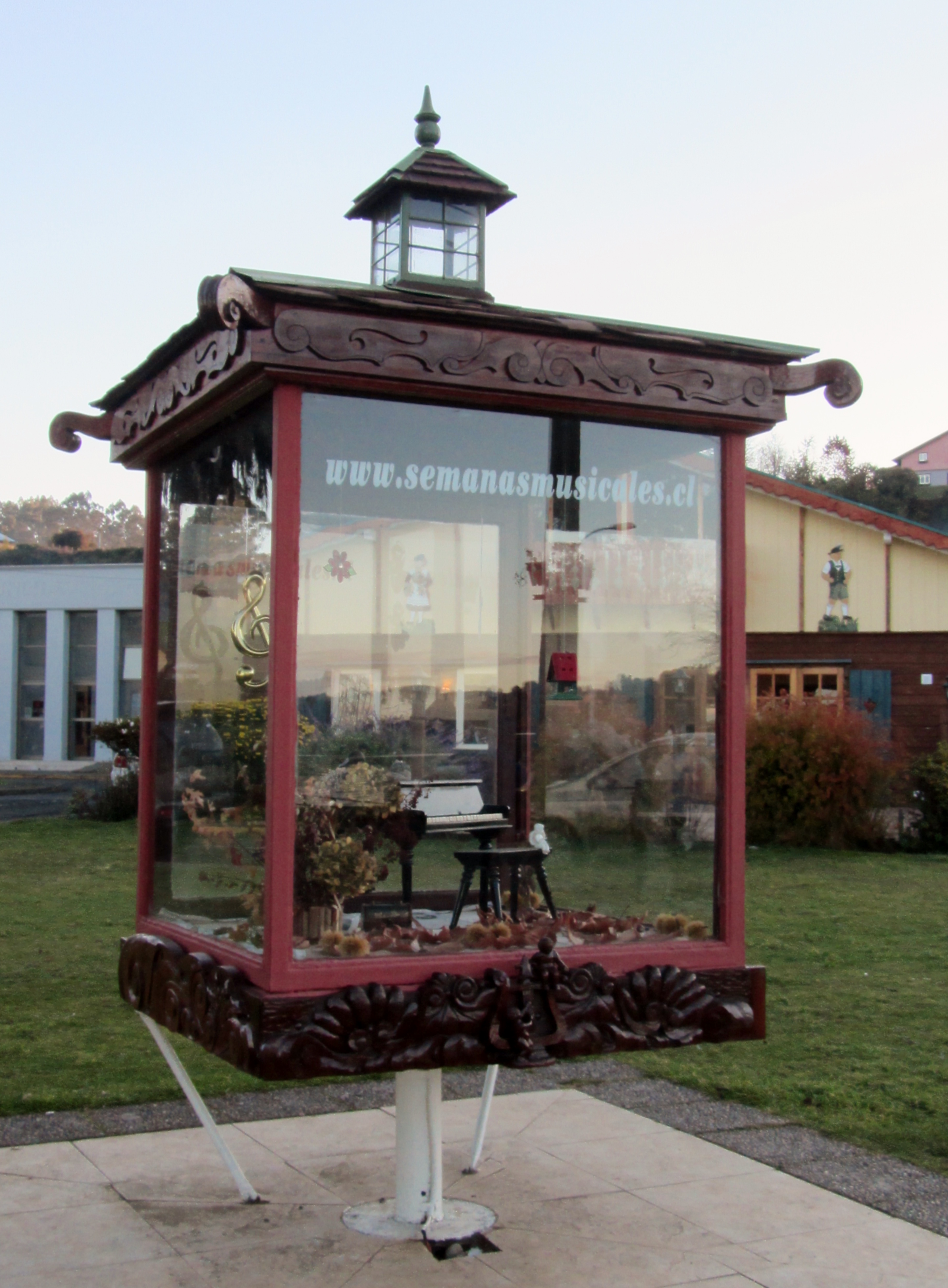 Vitrina musical en Frutillar, Chile